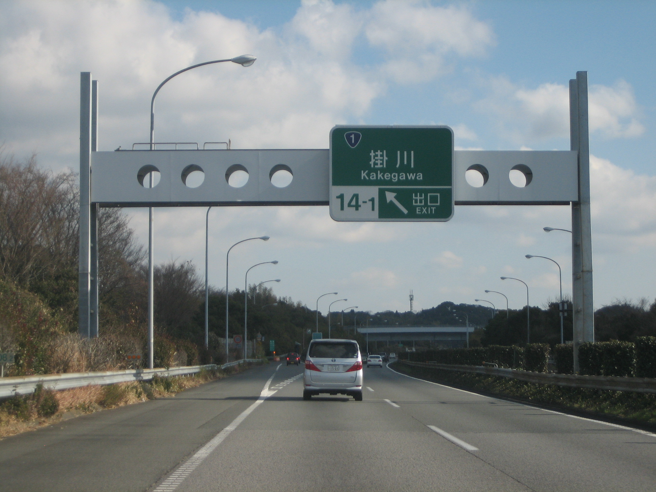 掛川IC